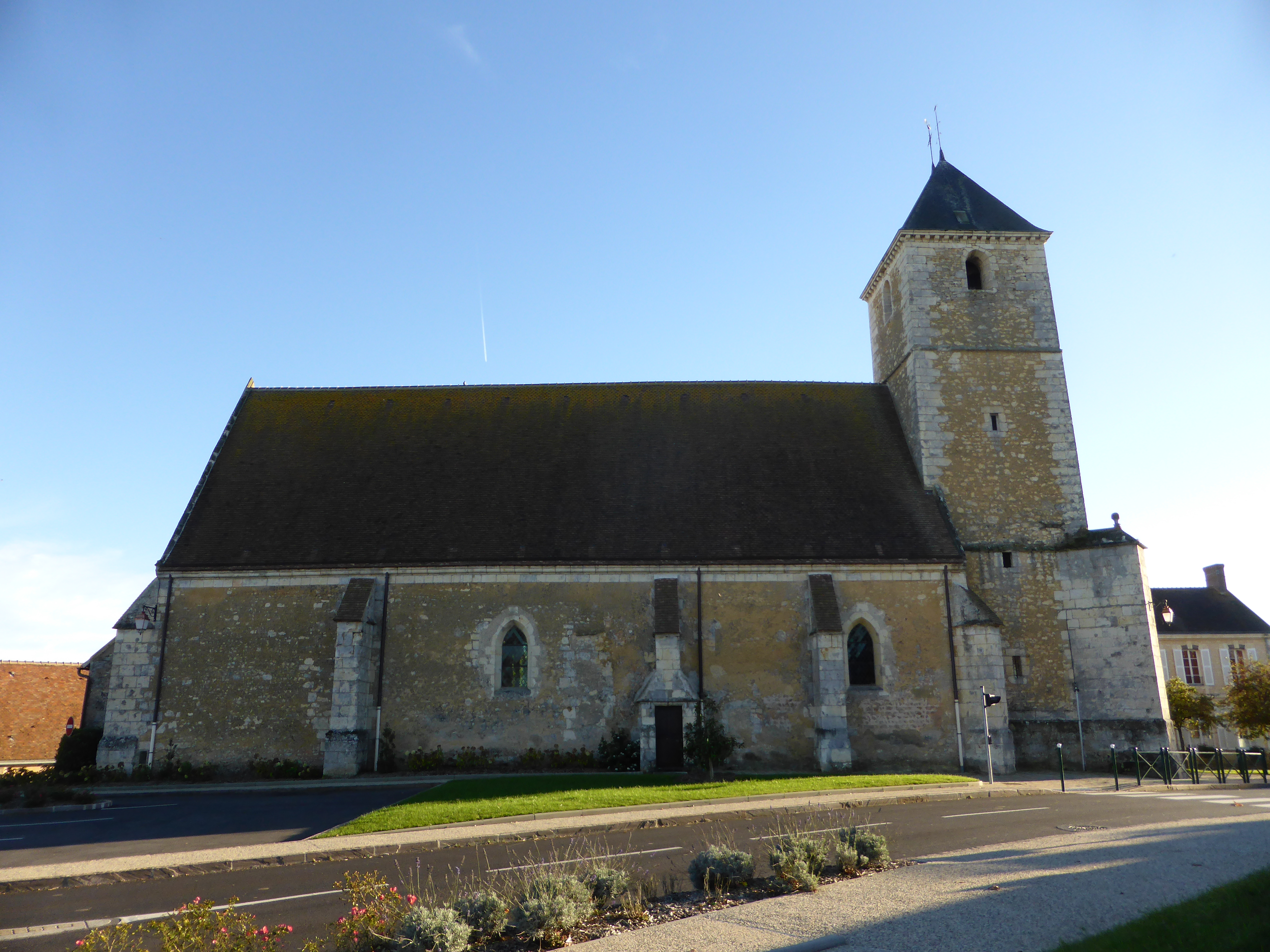 Église Saint-Rémi de la Rouge, dans l'Orne, en France.